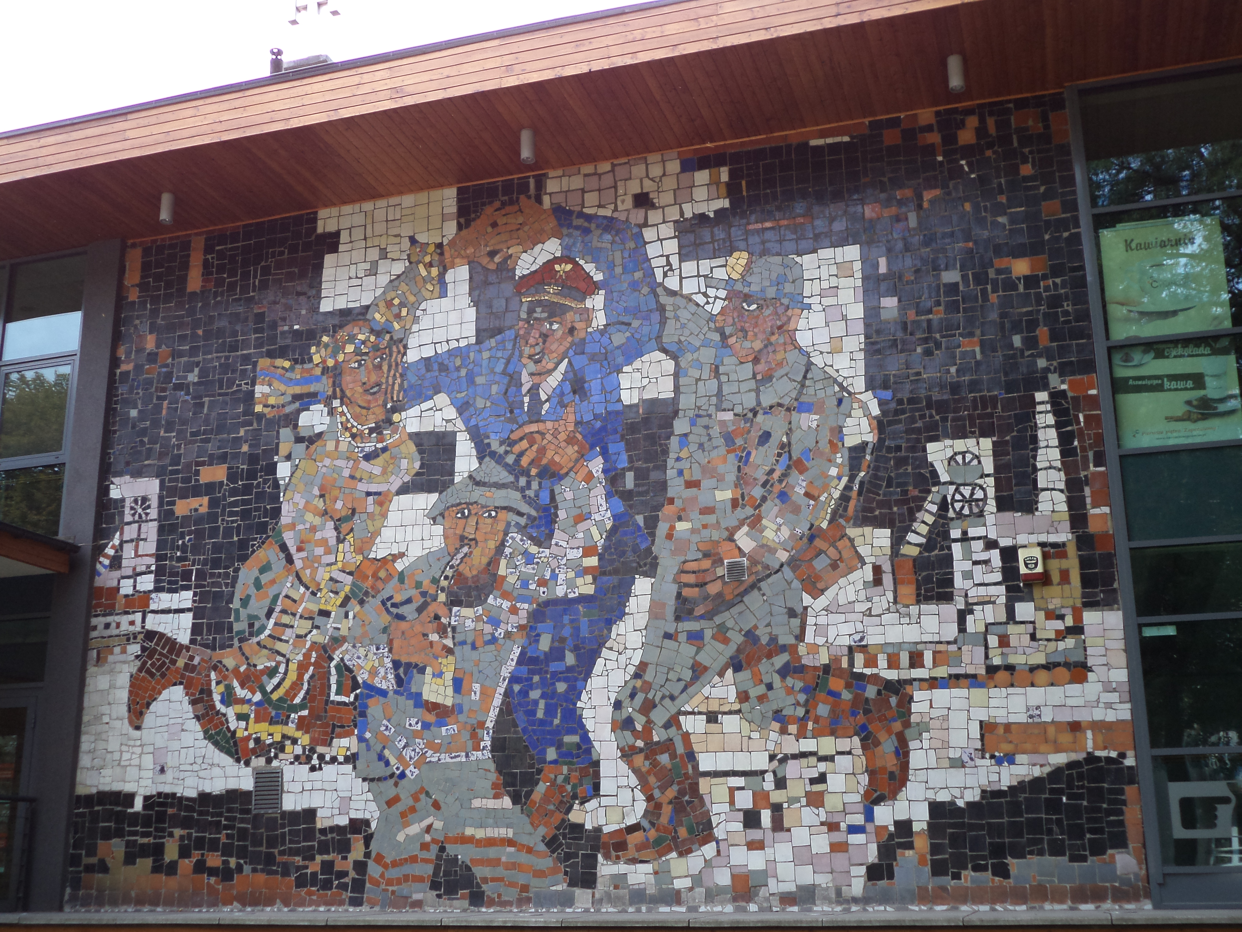 Mozaika przedstawiająca tańczących kolejarzy na fasadzie Tarnogórskiego Centrum Kultury